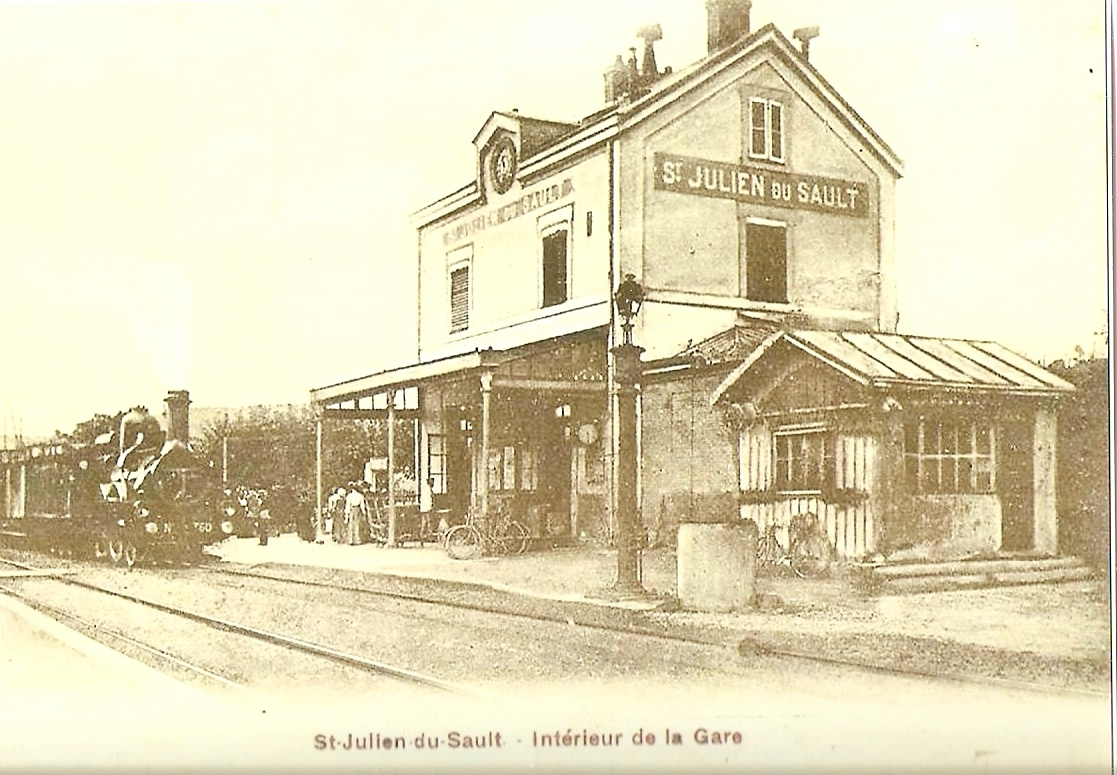 Il s'agit de la gare de Saint-Julien du Sault au début du 20 ème siècle avant la construction des maisons environnantes et au temps de la vapeur ouverte au public le 1er mai 1849